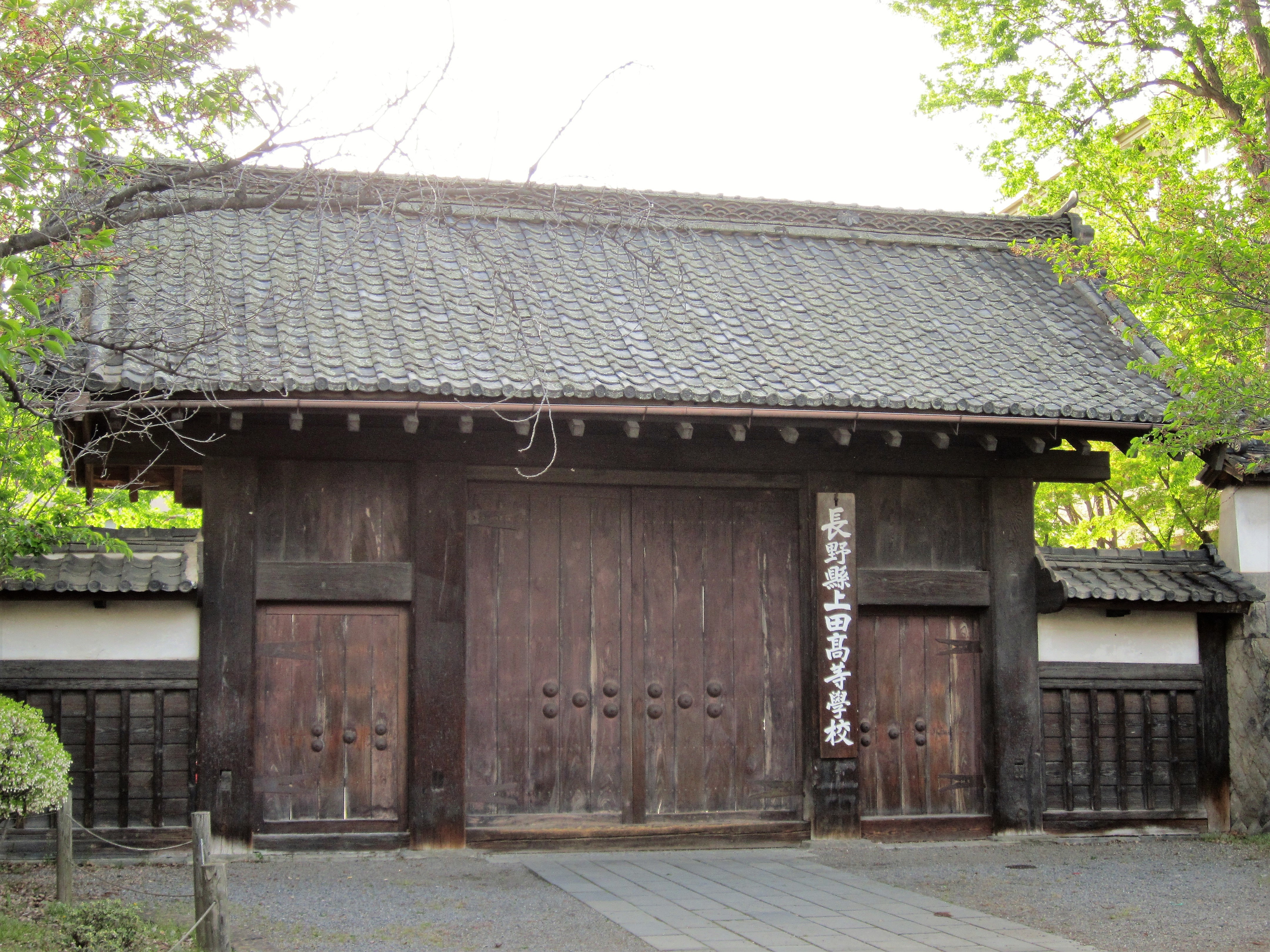 長野県上田高等学校